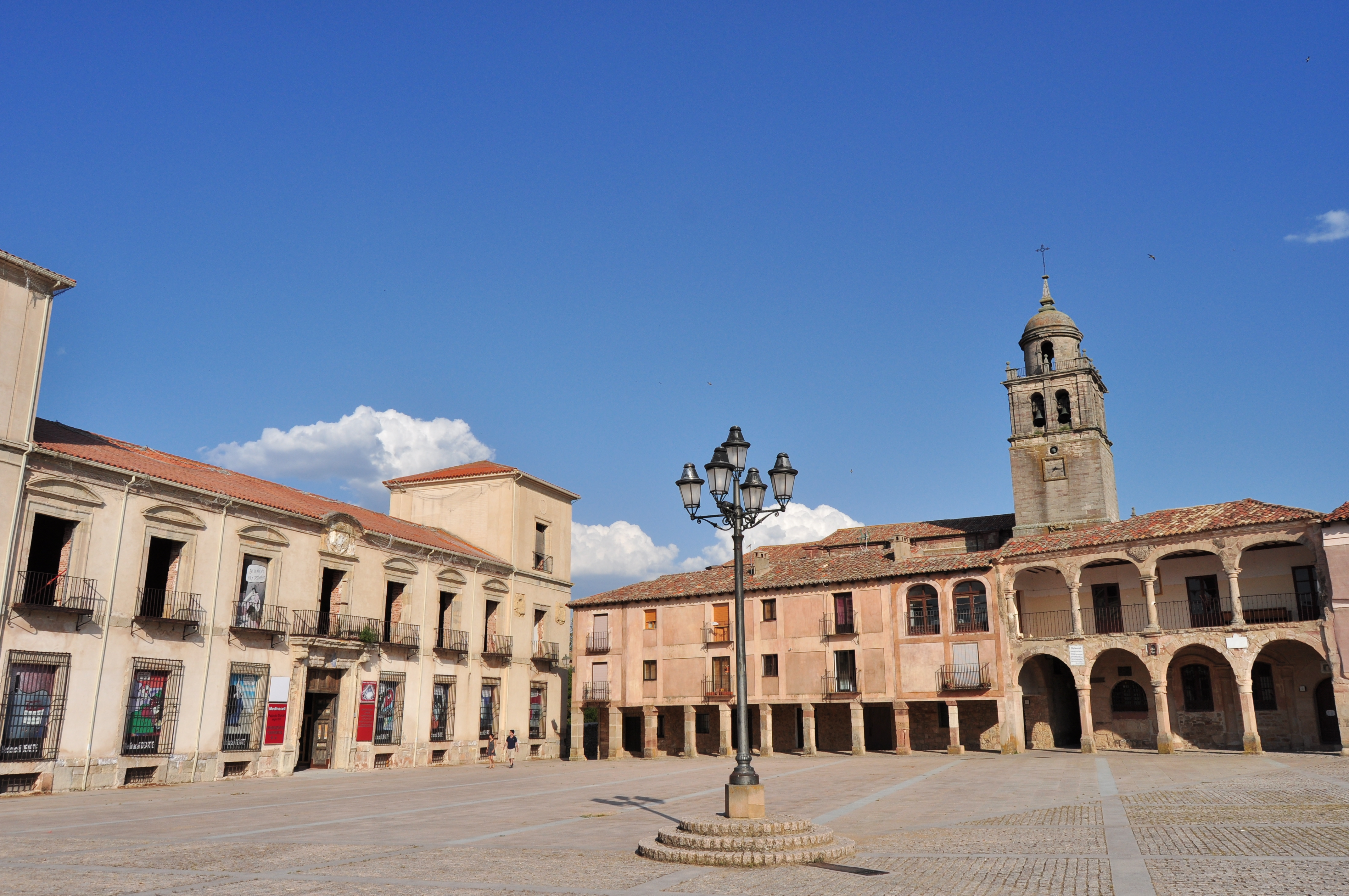 Medinaceli - 009